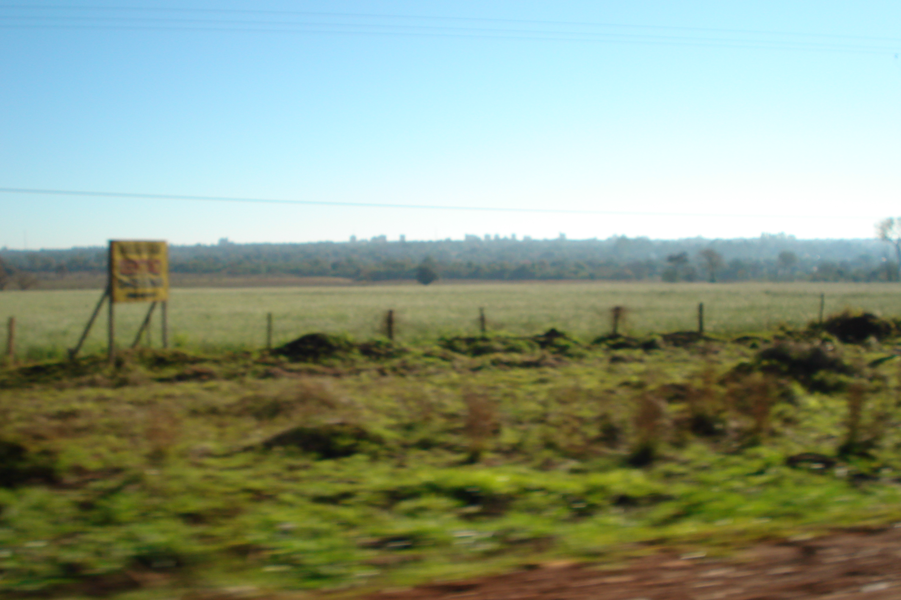 Dourados